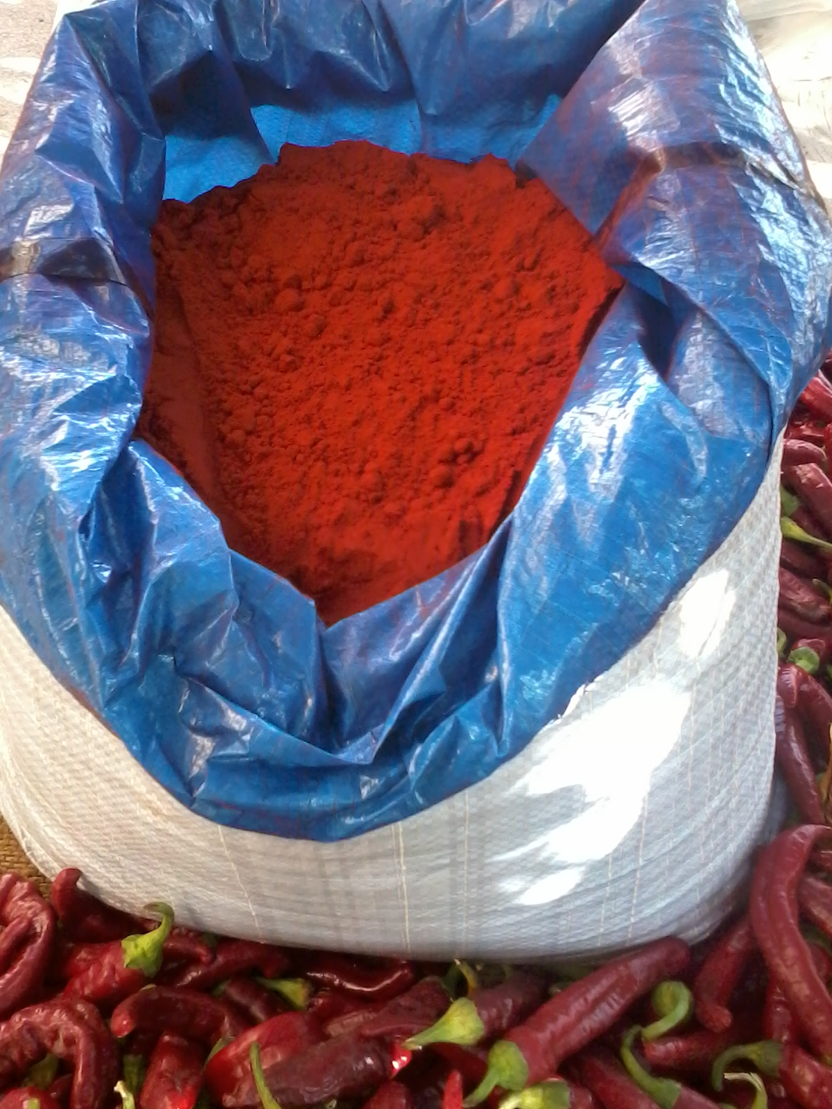 La zona de Candeleda y sus municipios limítrofes, junto con la comarca de la Vera, gozan de un microclima privilegiado que permite el cultivo del pimiento para obtención del pimentón de una calidad extraordinaria, muy valorado y demandado dentro y fuera de la provincia de Ávila. Procede el pimentón principalmente de pimientos de los géneros "Capsicum" y "Longum", cultivados en fértiles tierras del valle y regados con las finas aguas que bajan de la Sierra de Gredos. Esta conjunción de planta, suelo y agua, unidos al "saber hacer' y a la experiencia añeja de nuestros agricultores, va a dar lugar a esta preciada materia prima, la cual, tratada con el cariño que imprime la tradición, se convertirá en ese valioso condimento, imprescindible en le recetario de La vieja cocina castellana.